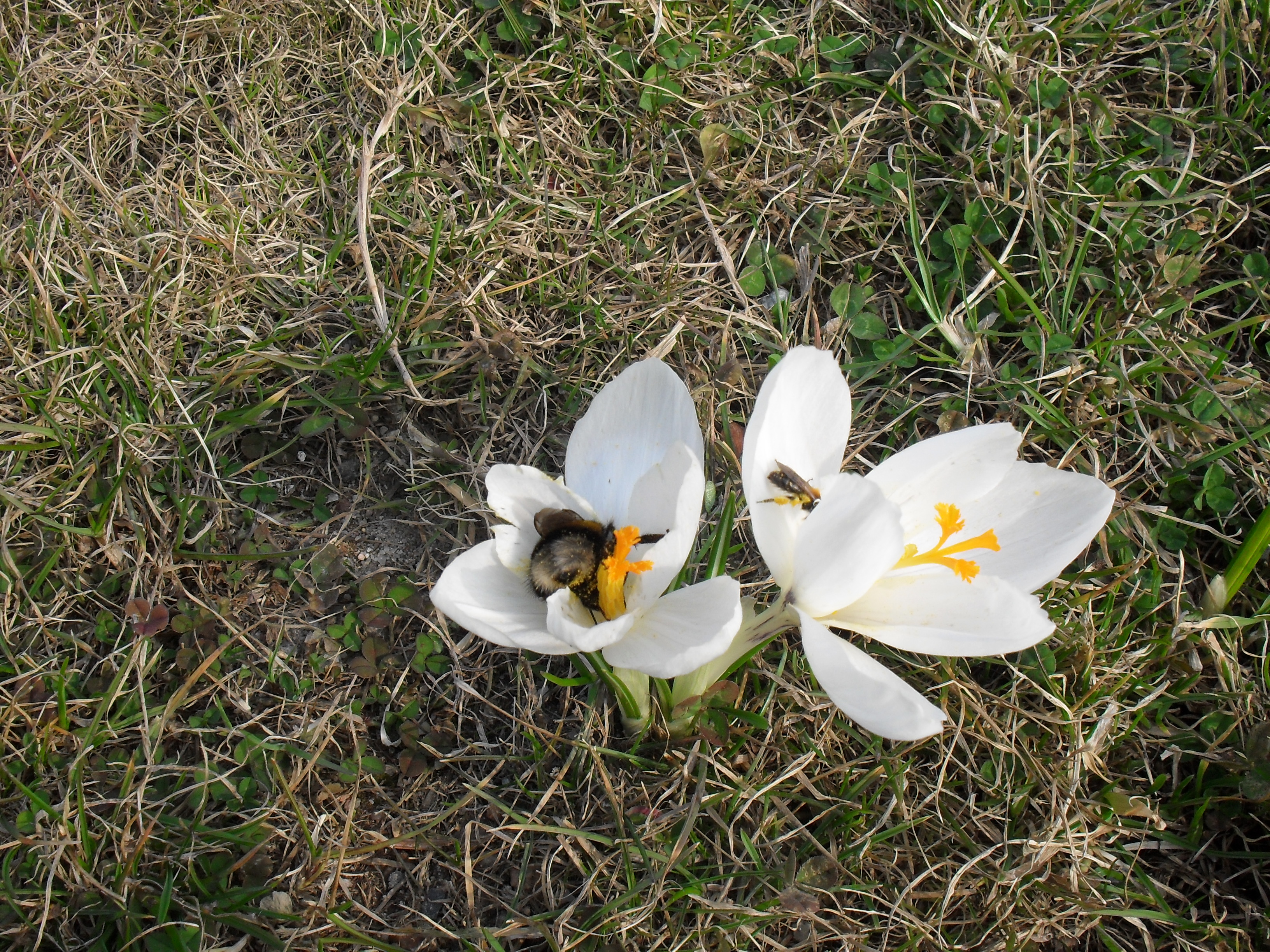 Trzmiel na kwiecie krokusa